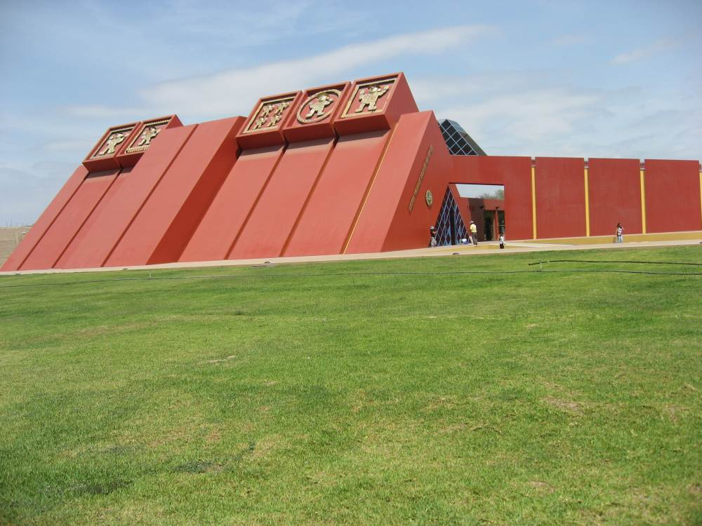 Lambayeque museum of Tumbas Reales de Senor Sipan